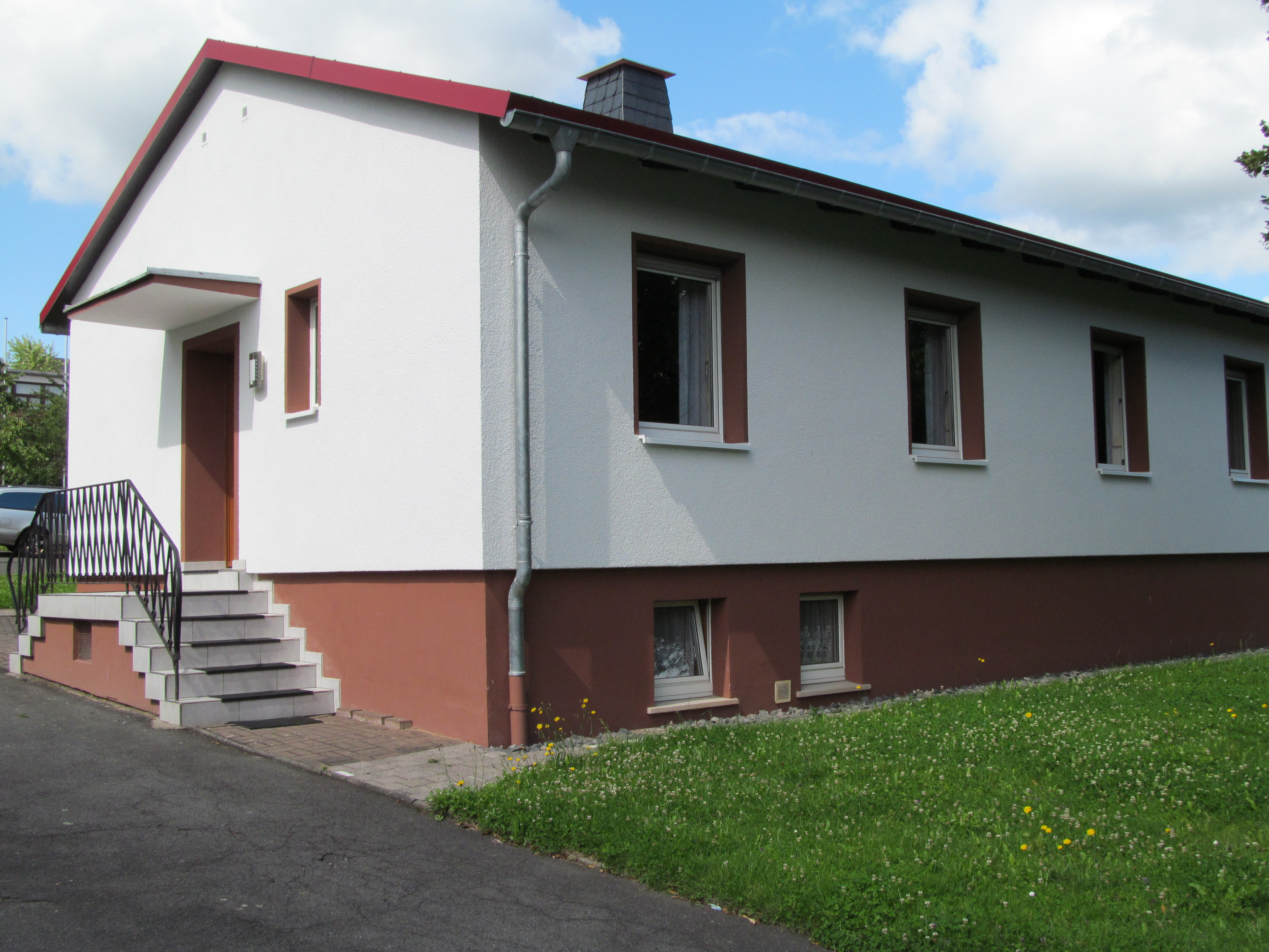 Giesel; Das katholische Pfarrjugendheim